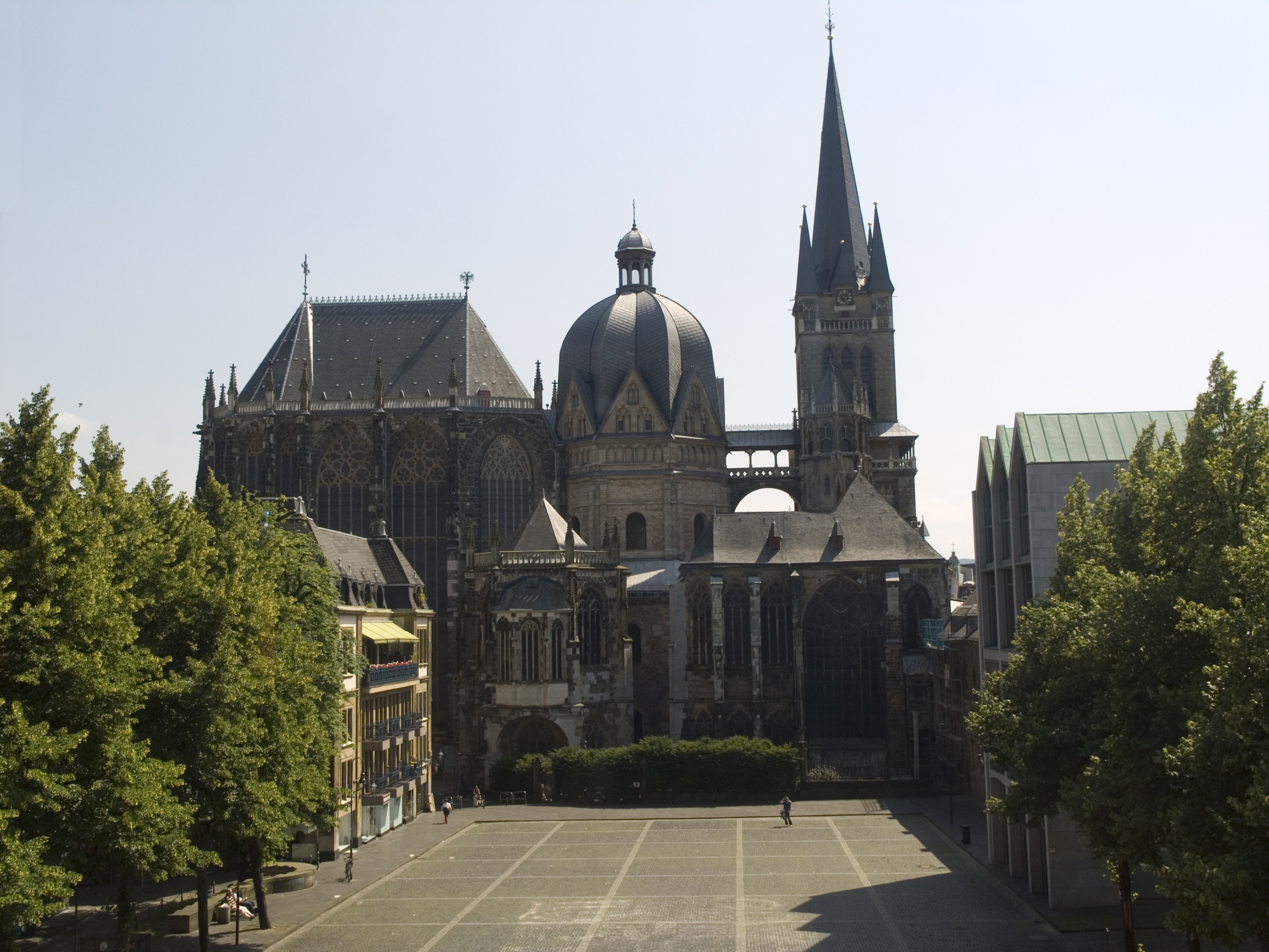 Северный Рейн - Вестфалия, Ахен - Вид на площадь Katschhof и Домский собор из здания ратуши